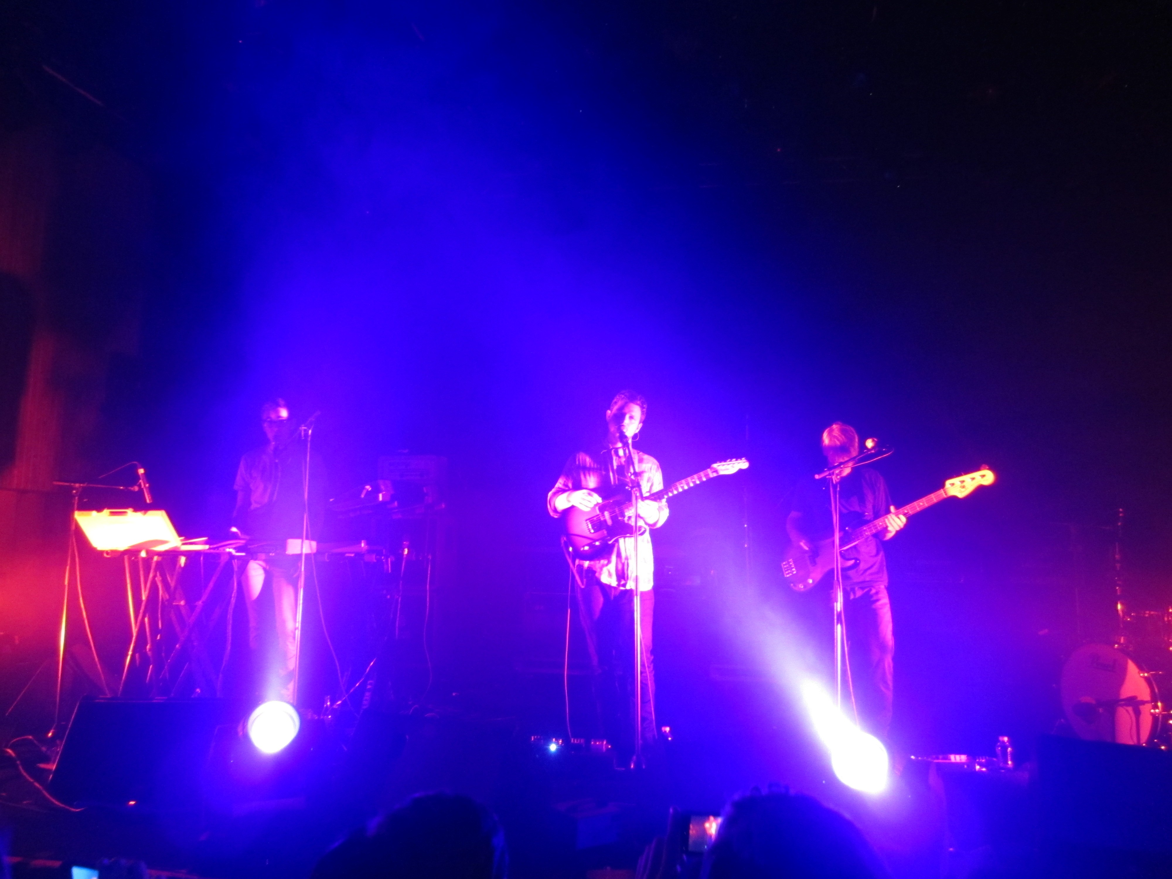 Группа Alt-J